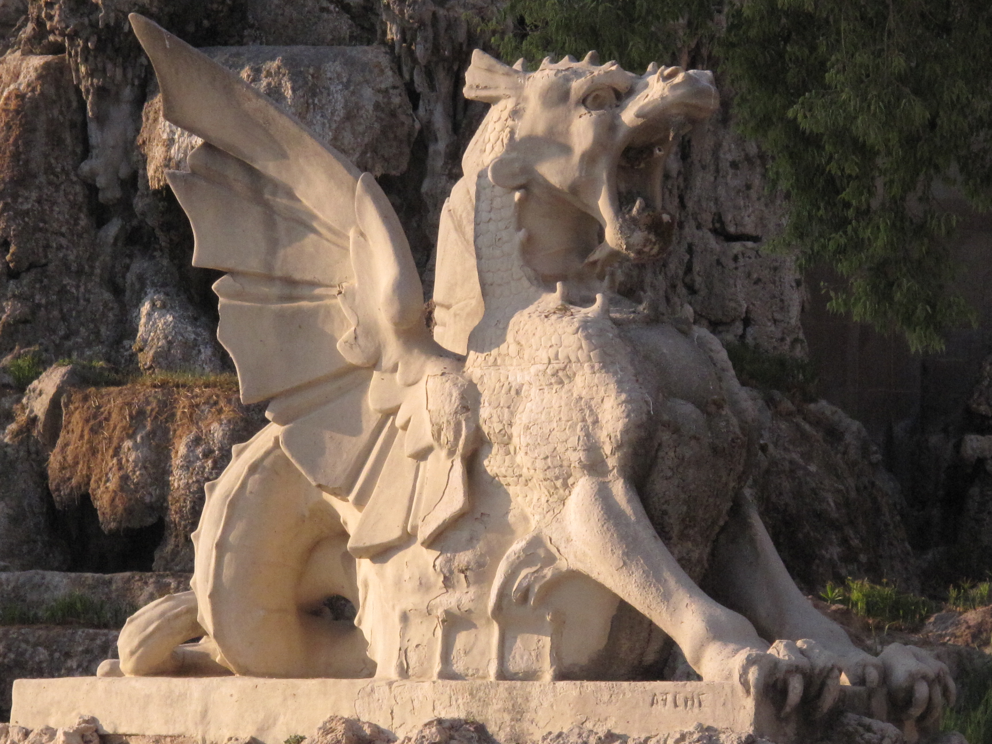 Drac de la font de la Cascada, de Rafael Atché, al parc de la Ciutadella (Barcelona)